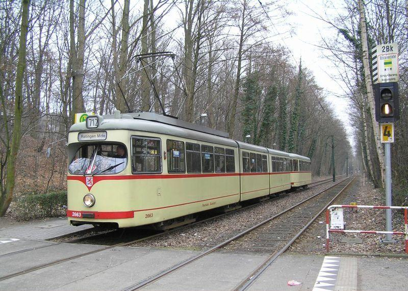 712 waldstadion